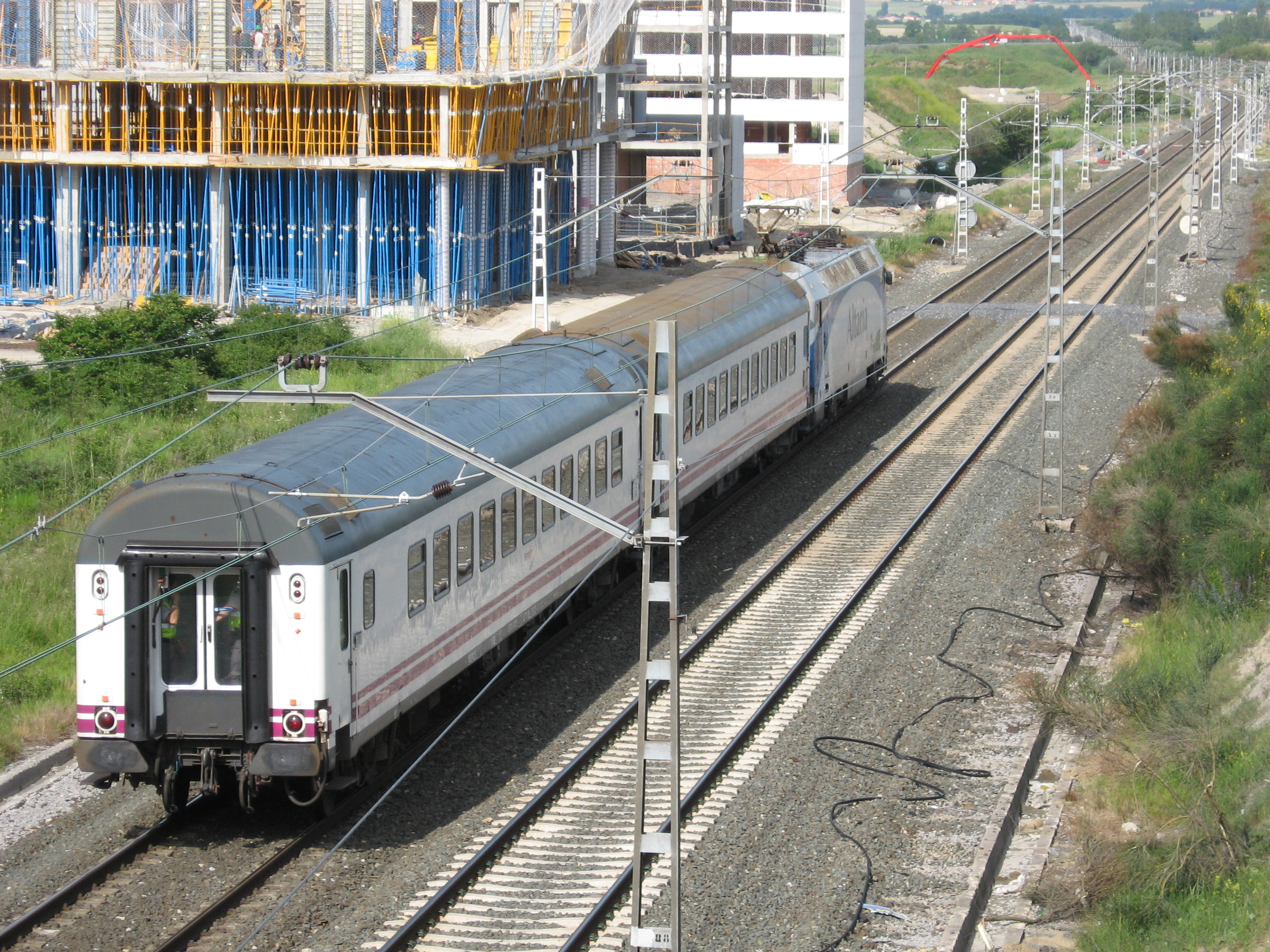 Desc: Diurno 280 saliendo de Vitoria con destino Irún, traccionado por una locomotora eléctrica de la serie 252.